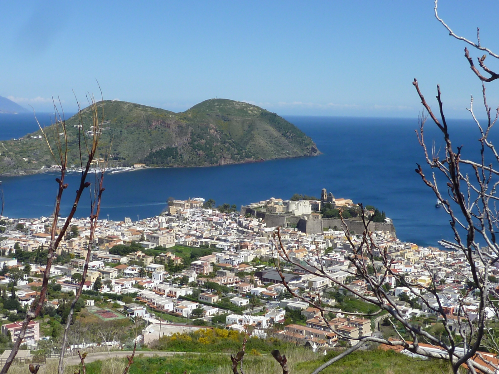 Blick auf die Stadt Lipari mit dem Castello und der Cathedrale.